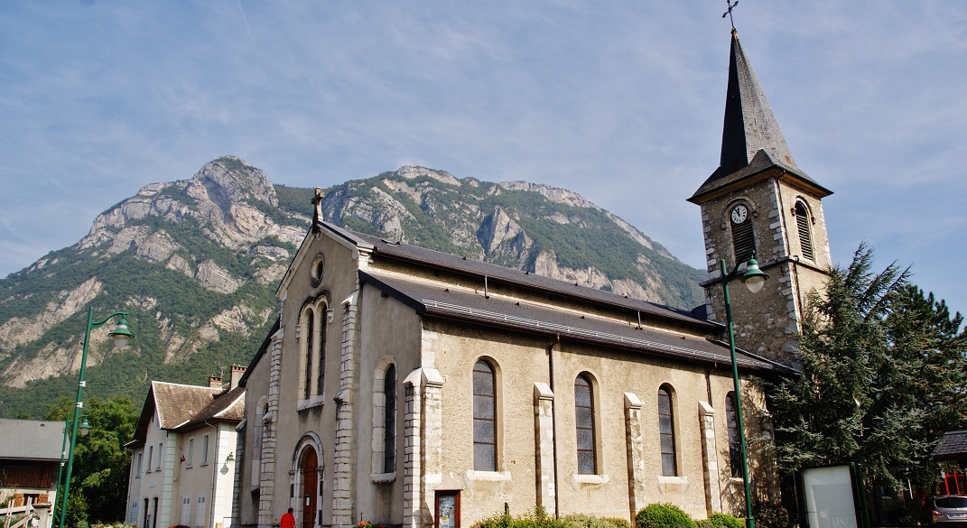 église St Blaise